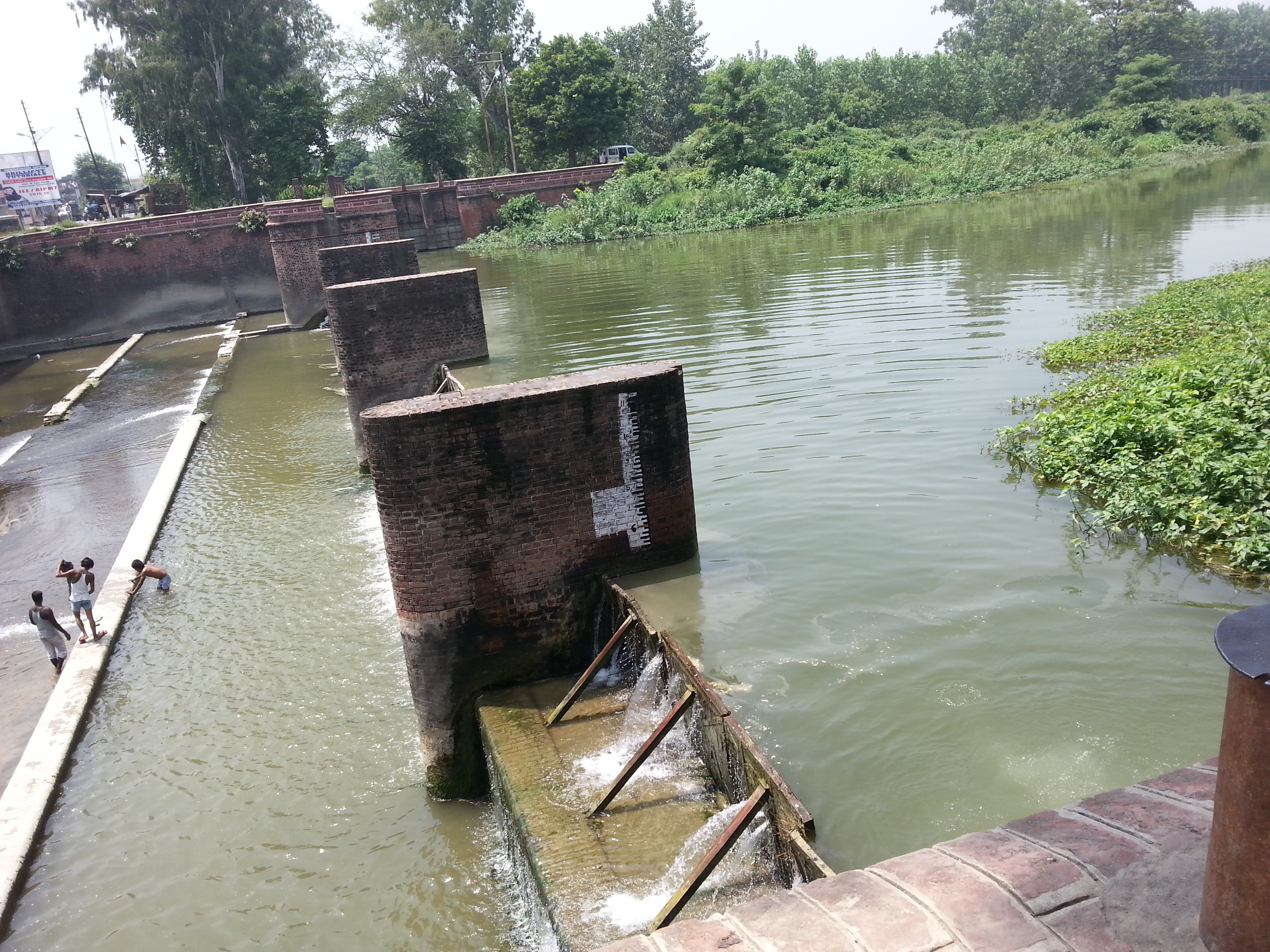 bilaspur.bhakra dam